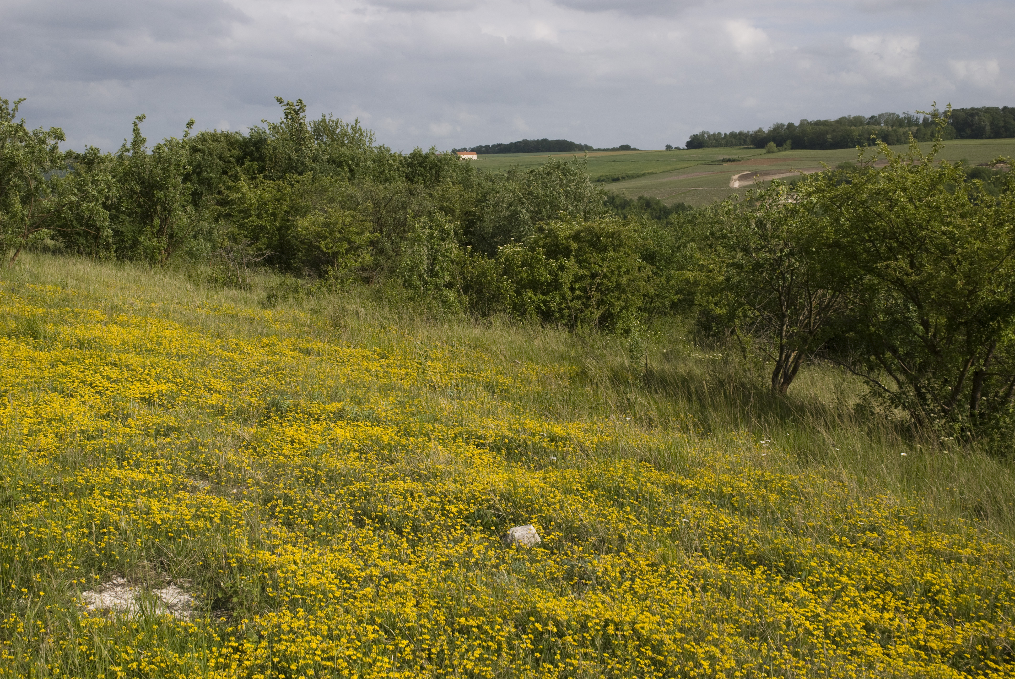 Hippocrepis comosa Pelouse de Chézy-sur-Marne), France